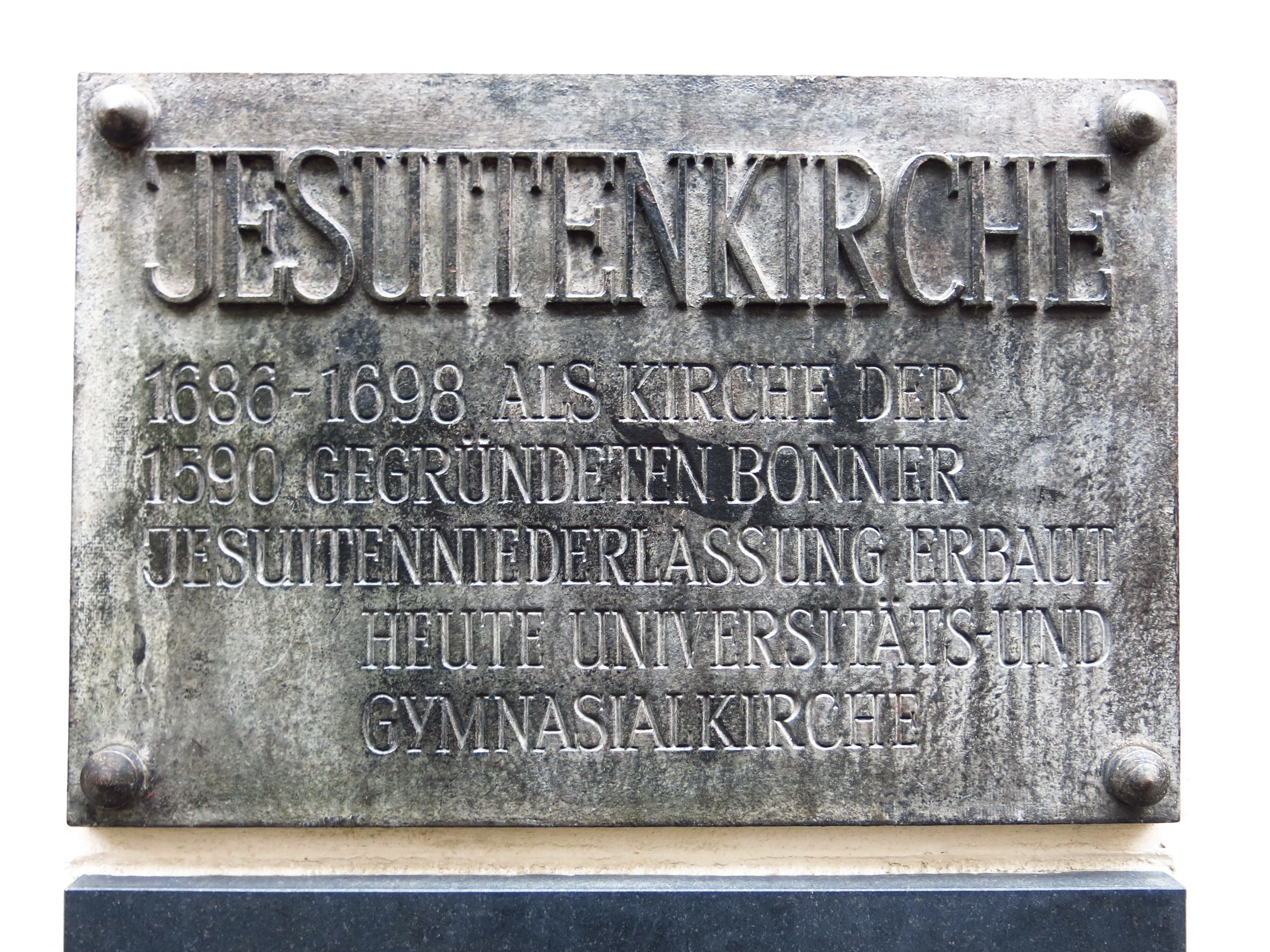 Namen-Jesu-Kirche in der Bonner Bonngasse.